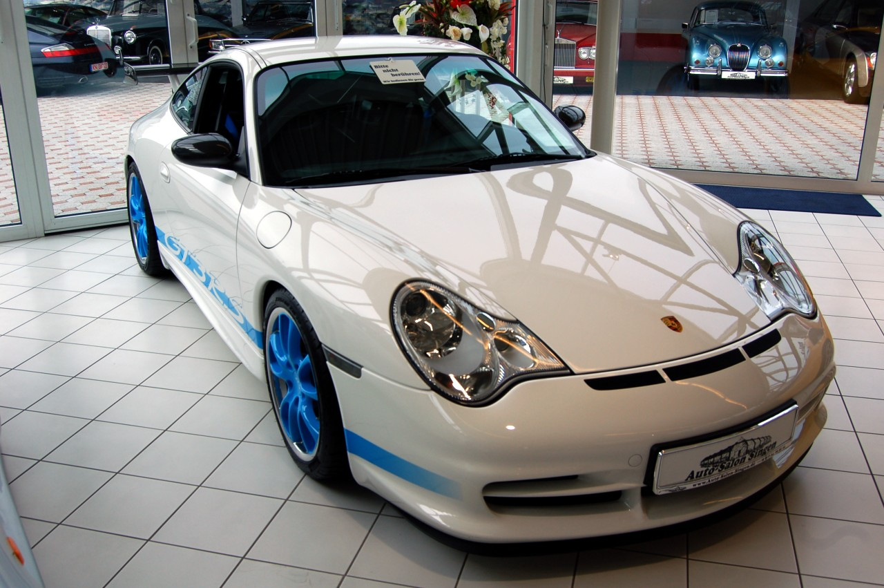 Porsche 911 GT3 RS (996) 2003 white-bluePorsche 911 GT3 RS